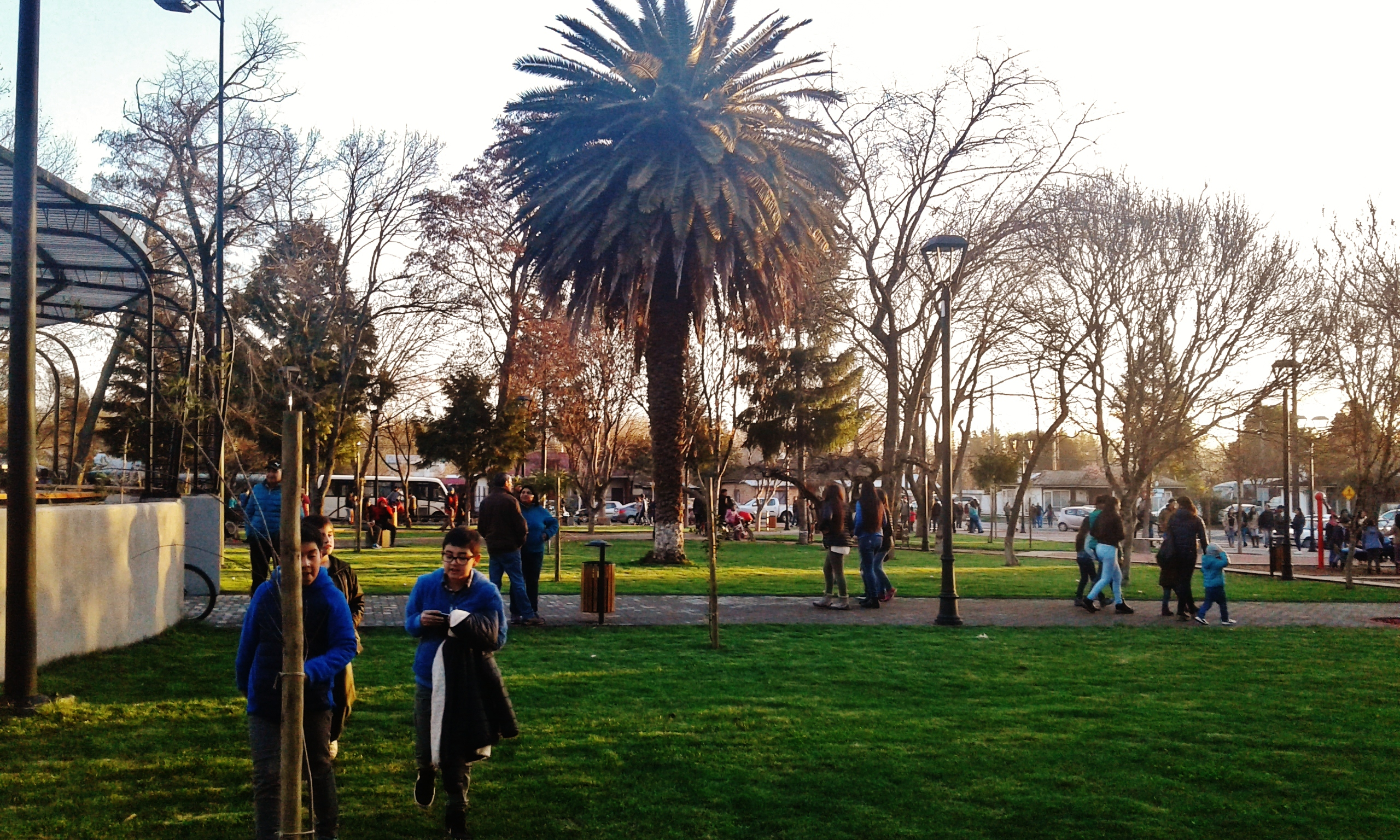 Plaza de Armas de Monte Águila, Chile